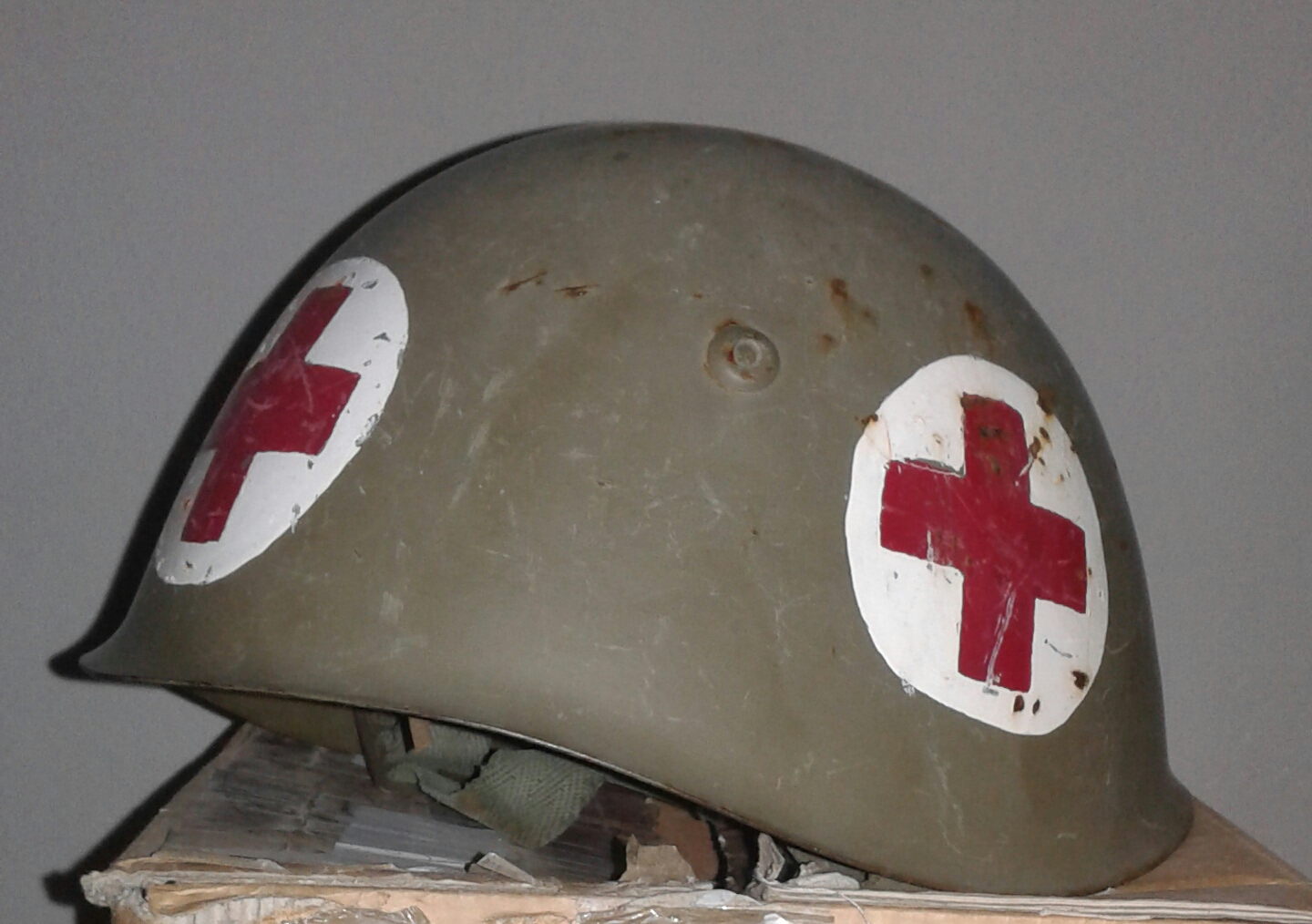 Elmetto M33 italiano degli anni '60 del Servizio di sanità militare